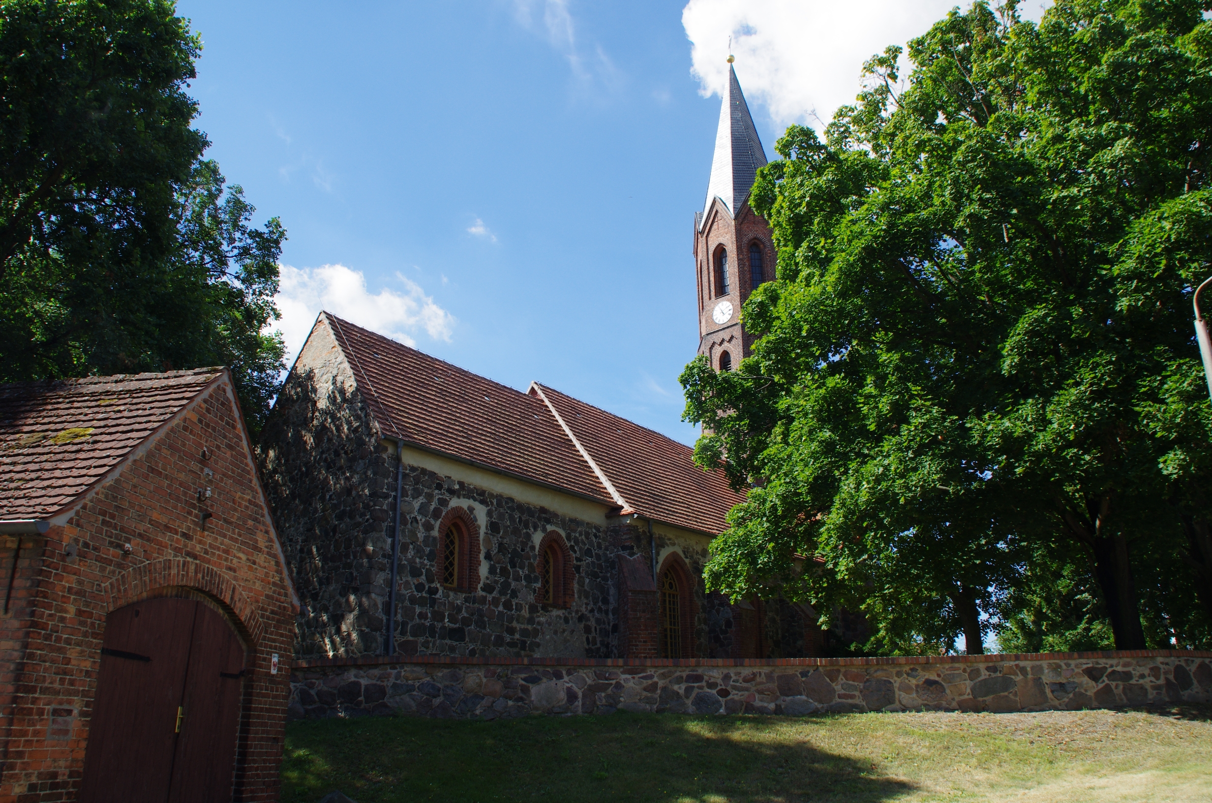 Niedergörsdorf in Brandenburg. Die Kirche in Bochow steht unter Denkmalschutz.